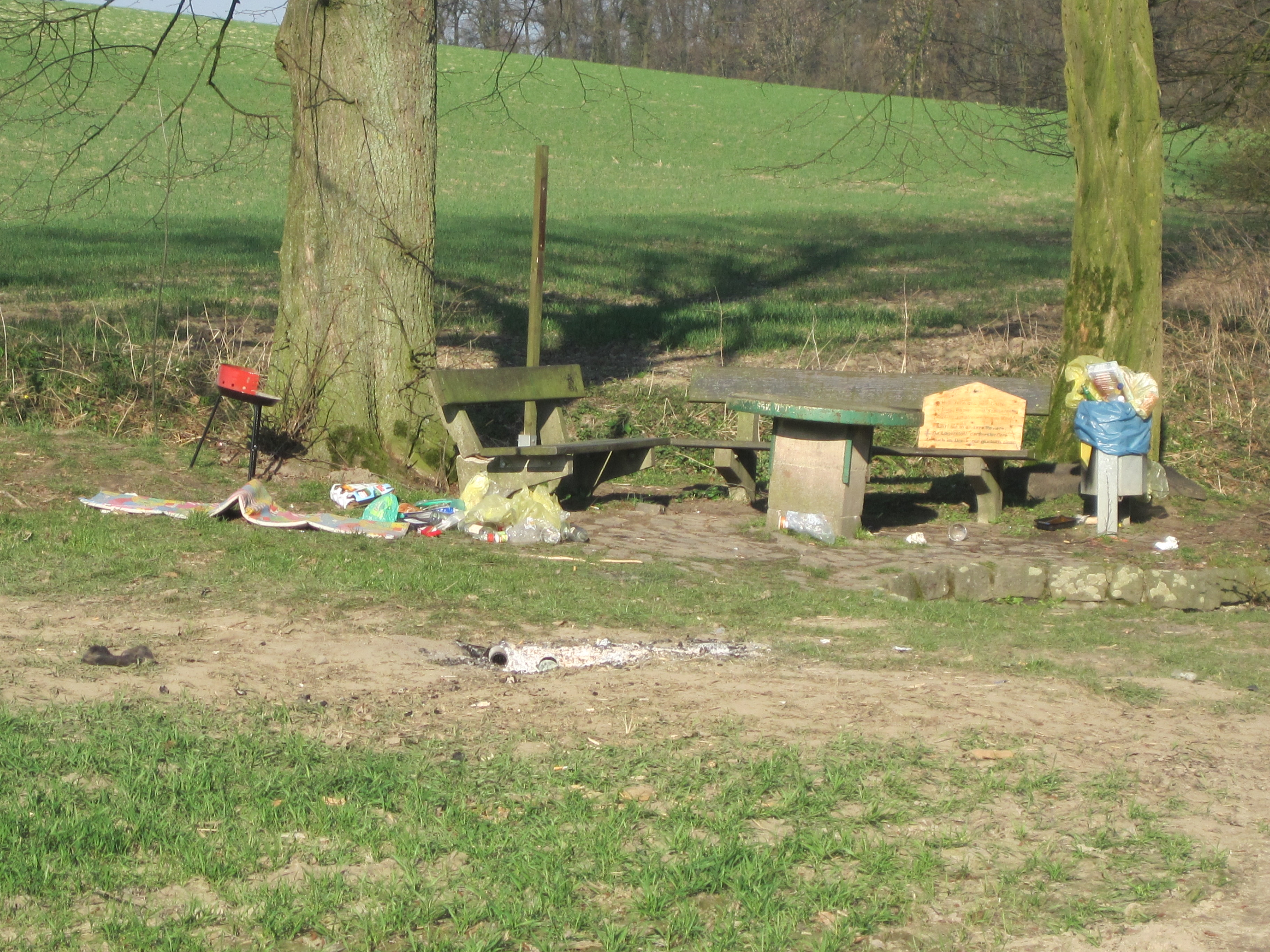 Das Foto zeigt das Ergebnis von Vandalismus an der Geineggequelle in Hamm-Bockum-Hövel.